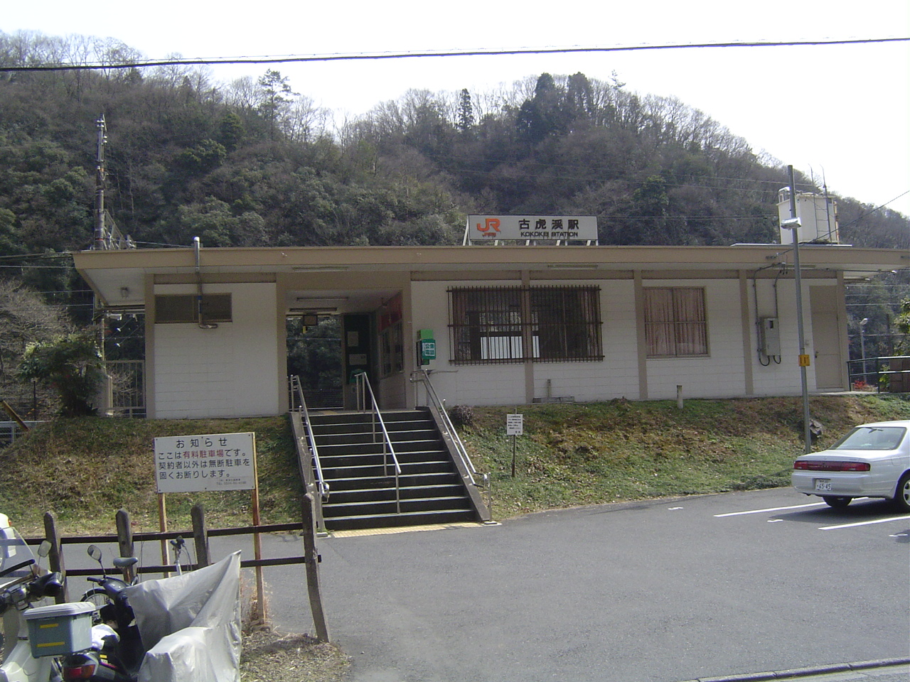 古虎渓駅駅舎